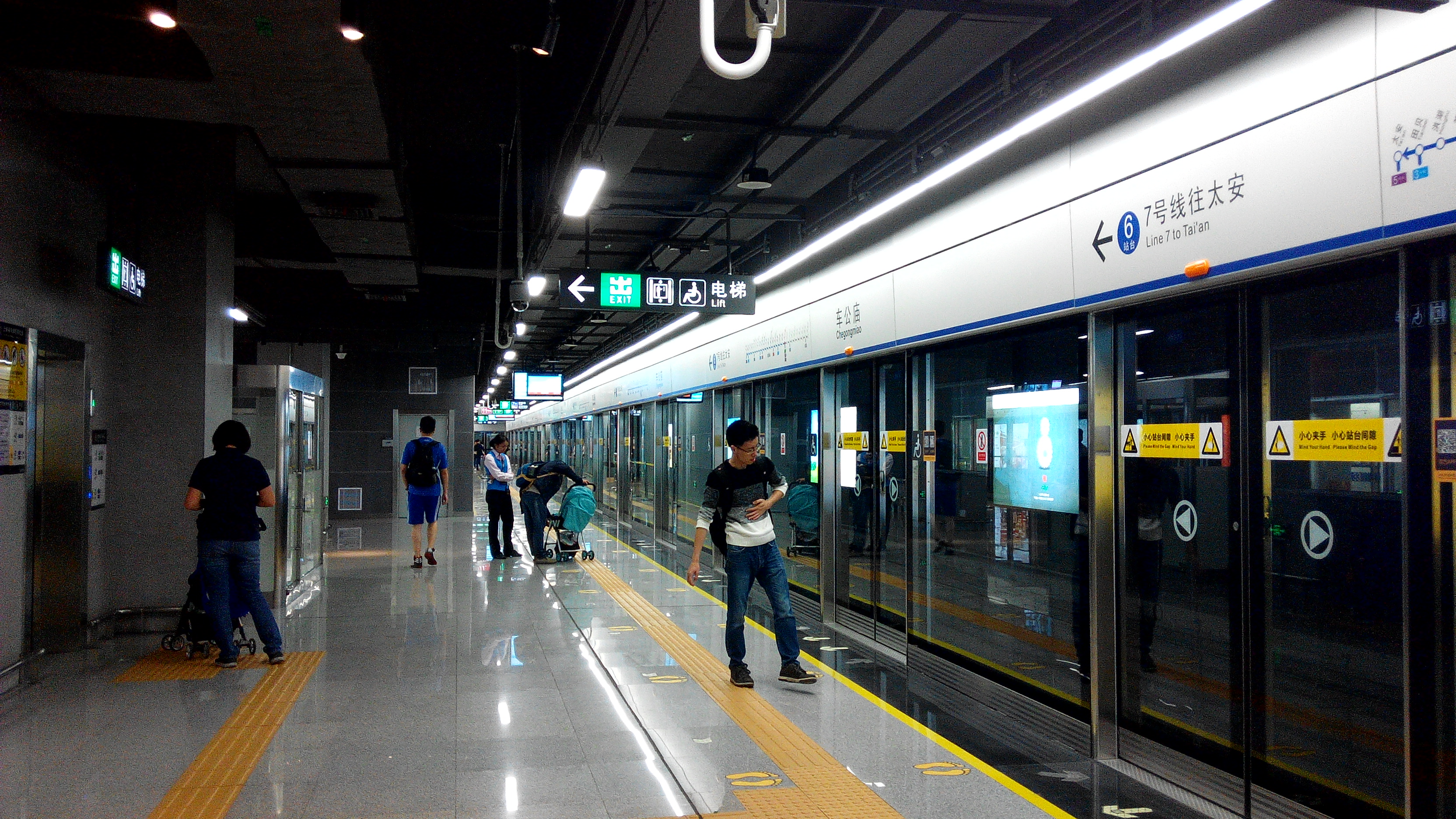 深圳地铁7号线 车公庙站6号站台